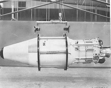 Discoverer 1 satellite, before launch